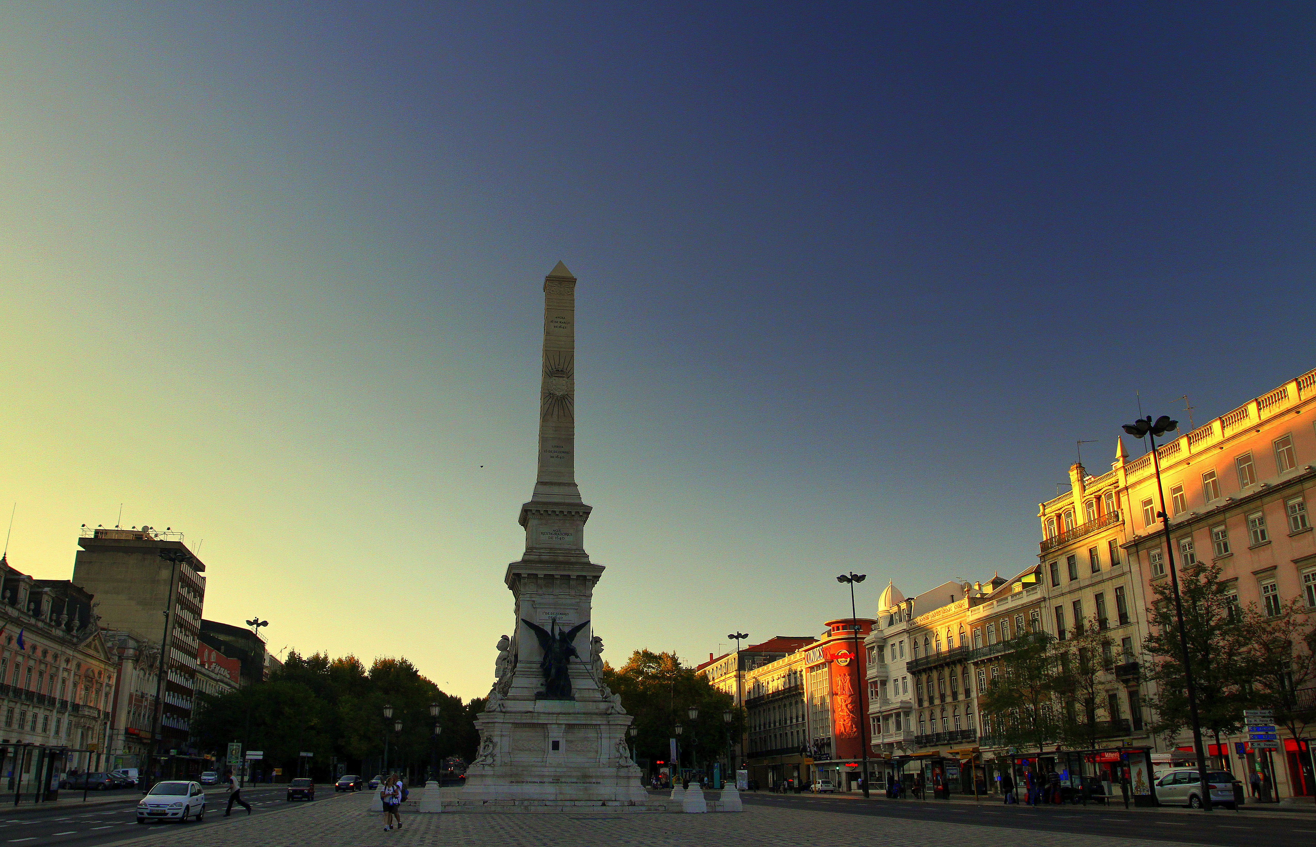 Avenida da Liberdade This file was uploaded for Wiki Loves Monuments in Portugal with the unique identifier 71712.